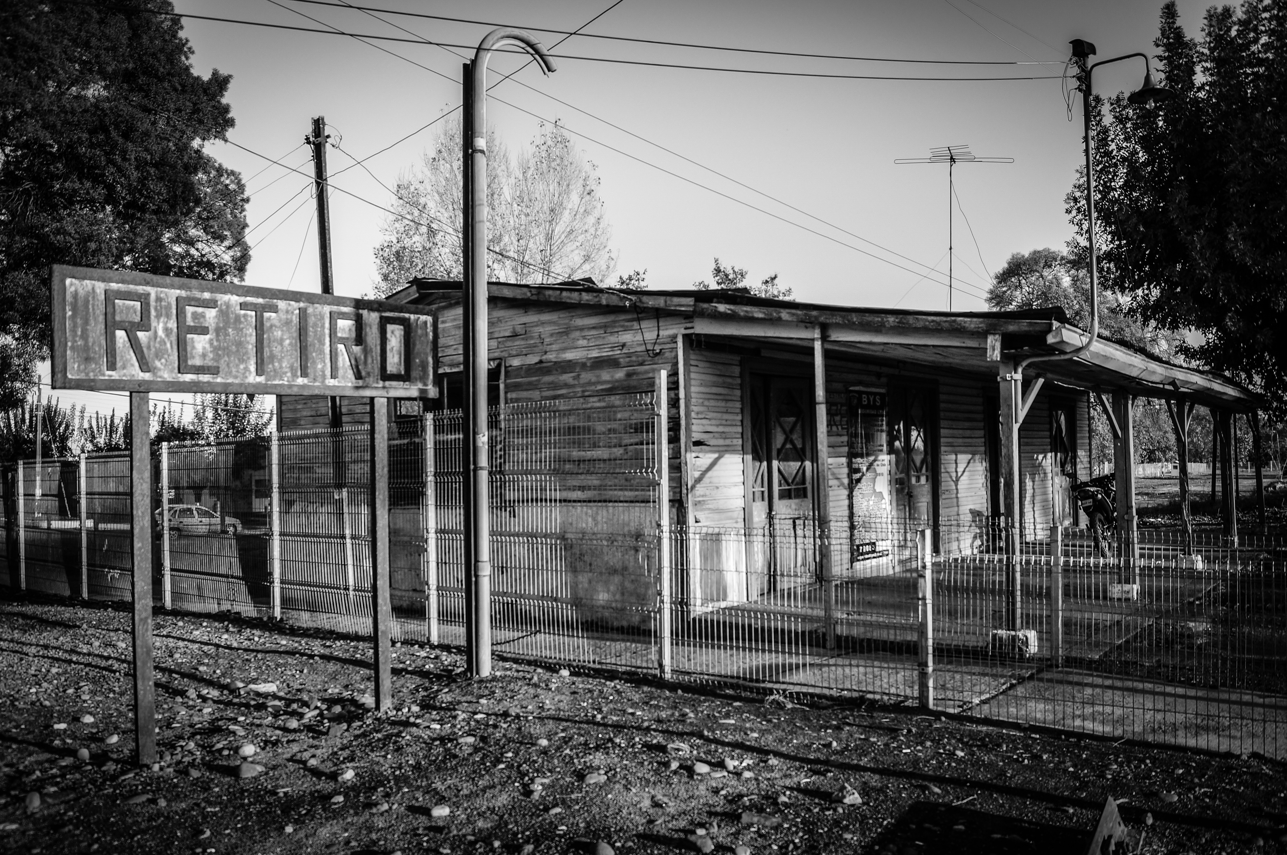 Estación ferroviaria de Retiro